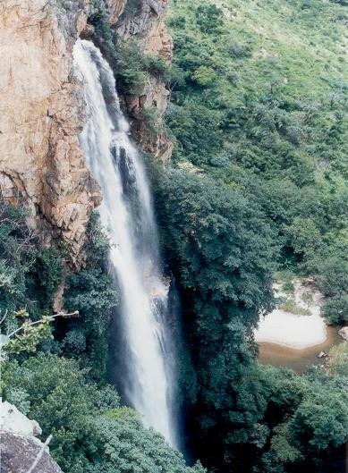 Foto da Cachoeira de Maria Rosa